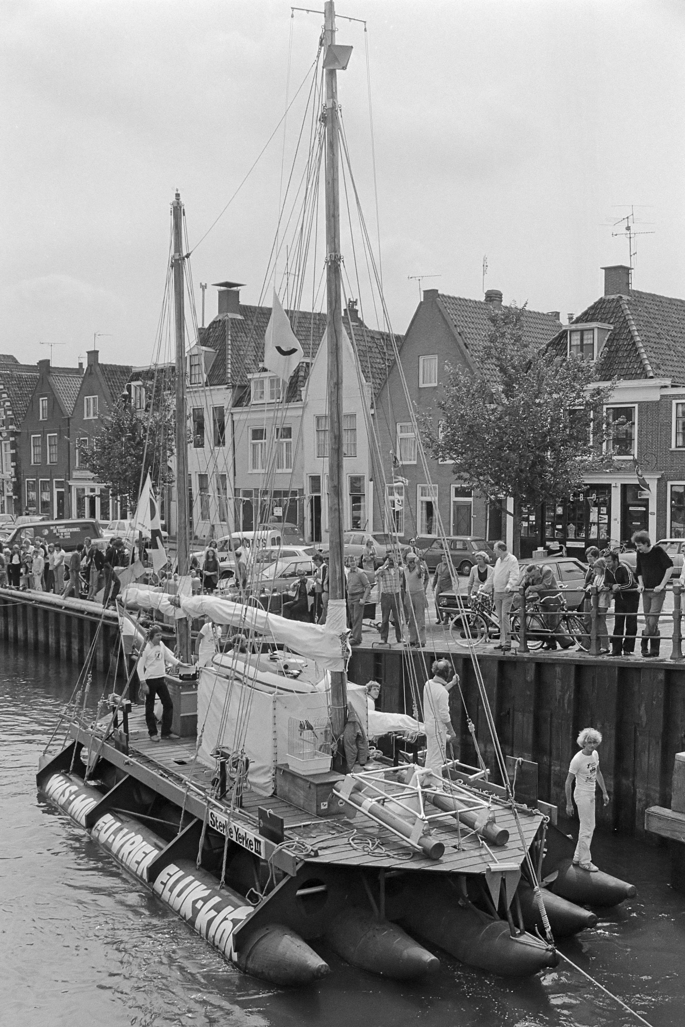 Het vlot "De sterke Jerke III" vertrekt vanuit Harlingen naar Curaçao 1 augustus 1979